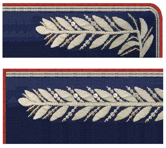 шитье 1947